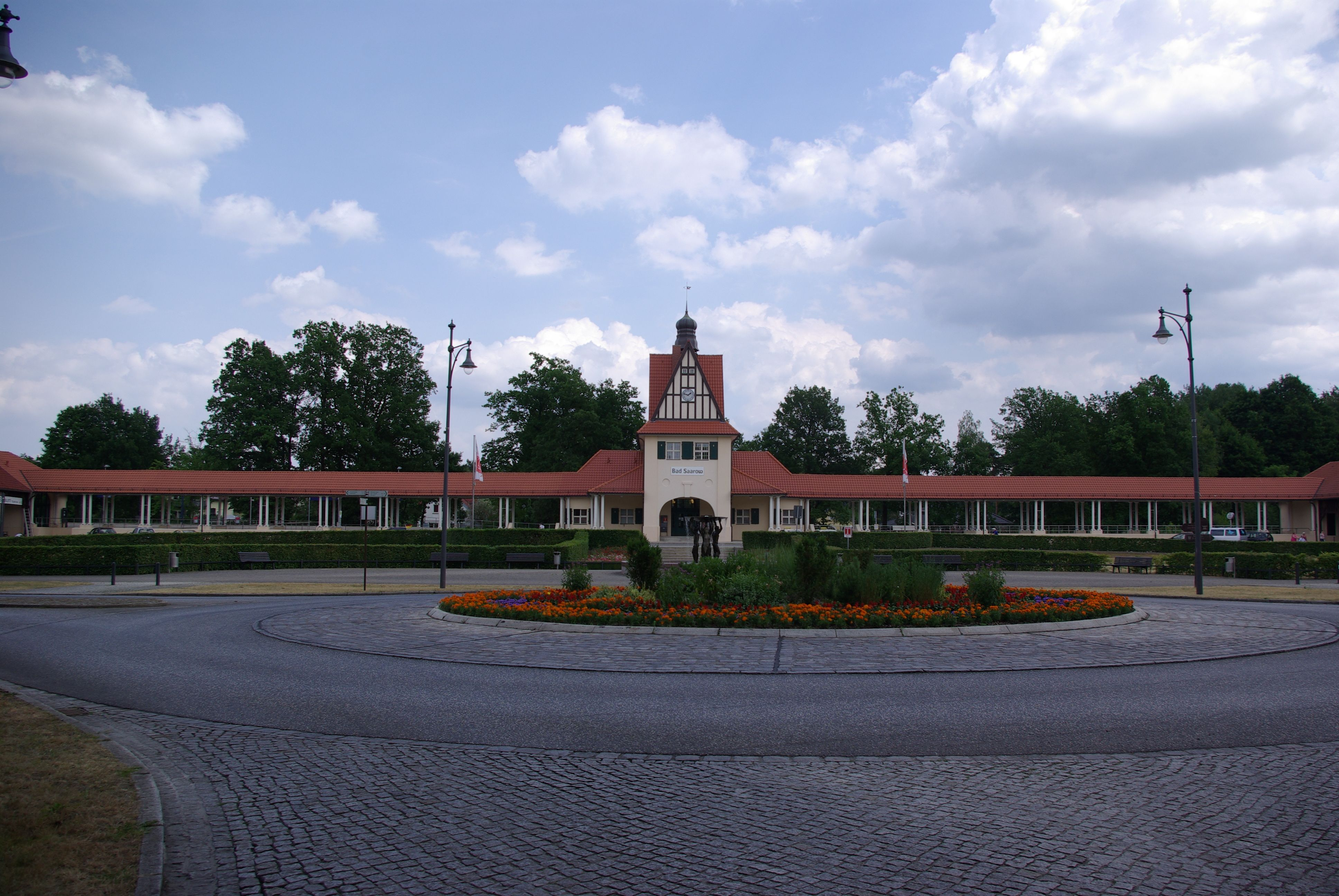 Bad Saarow in Brandenburg. Der Bahnhof steht unter Denkmalschutz.